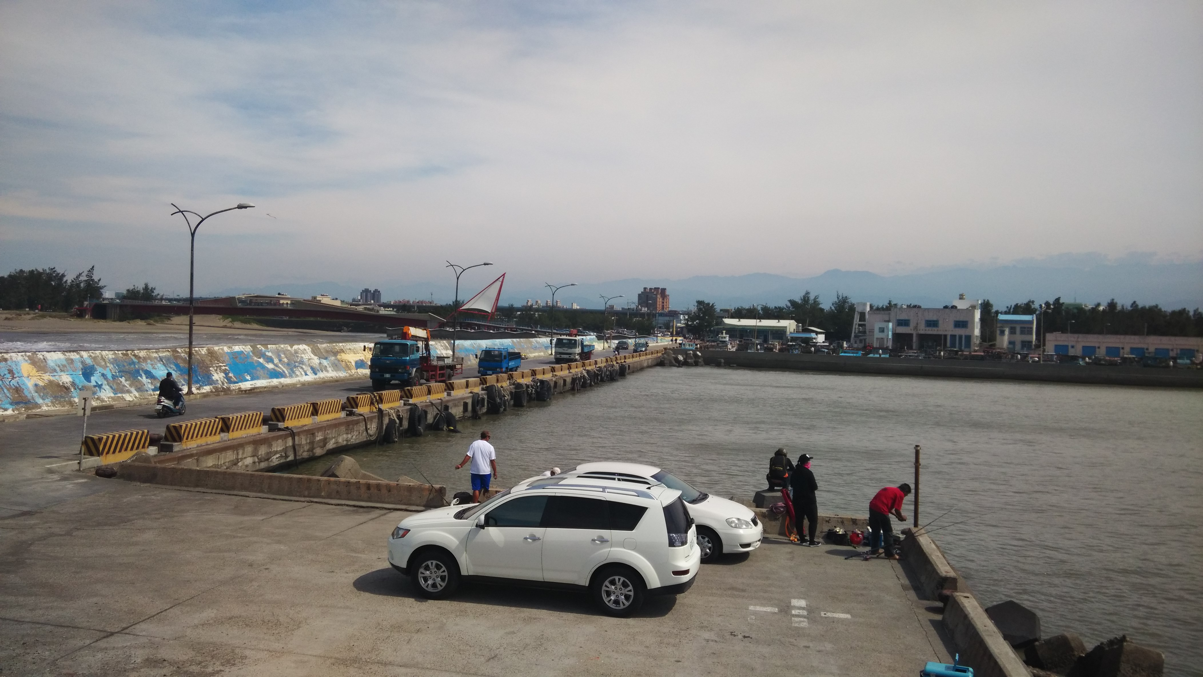 中文（台灣）: 龍鳳漁港一景